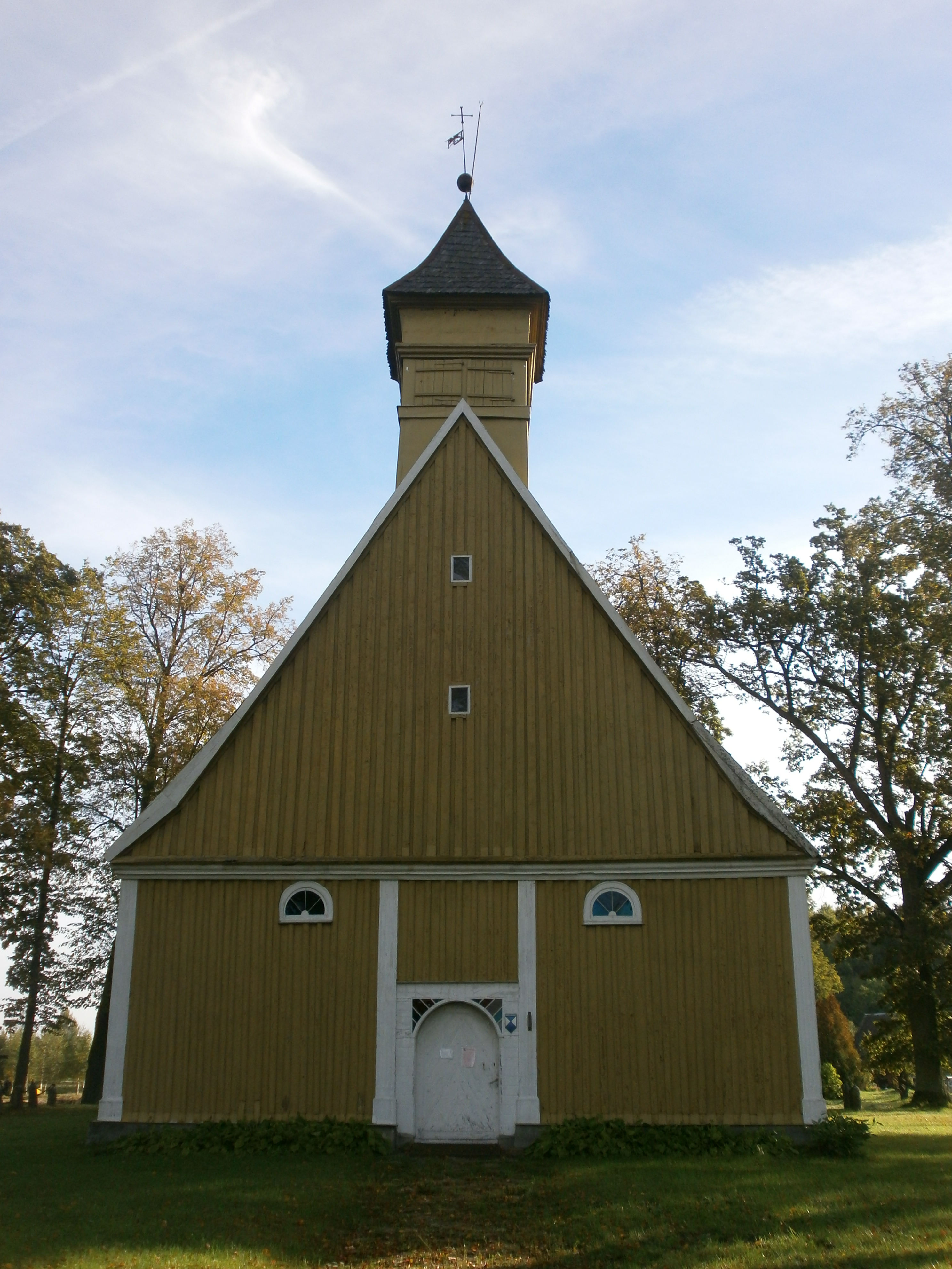 Līvbērzes katoļu baznīca, Līvbērze